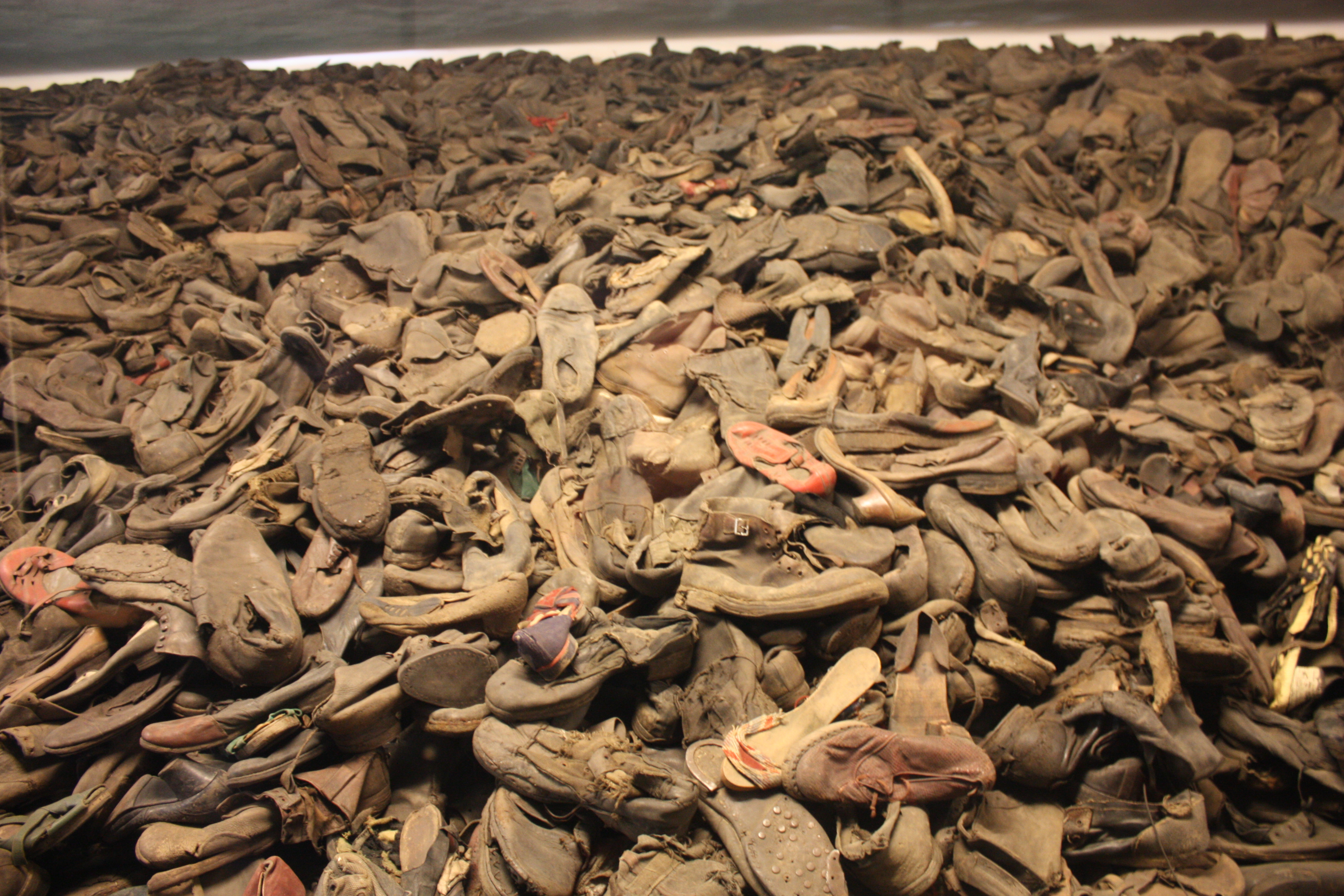 Oświęcim, obóz koncentracyjny "Auschwitz-Birkenau", 1940-1945